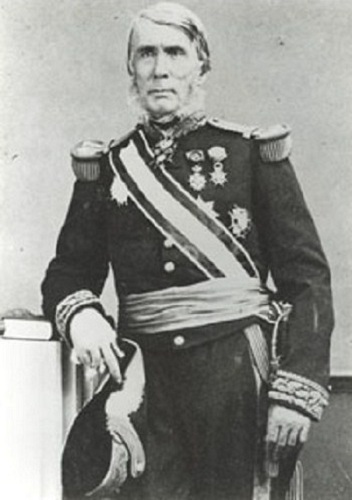 Louis Adolphe Bonard, né le 27 mars 1805 à Cherbourg et décédé le 31 mars 1867 à Amiens, était un amiral et administrateur colonial français.